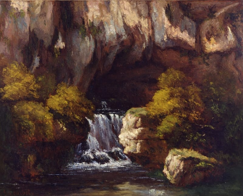 La fonte del Lison Courbet 184